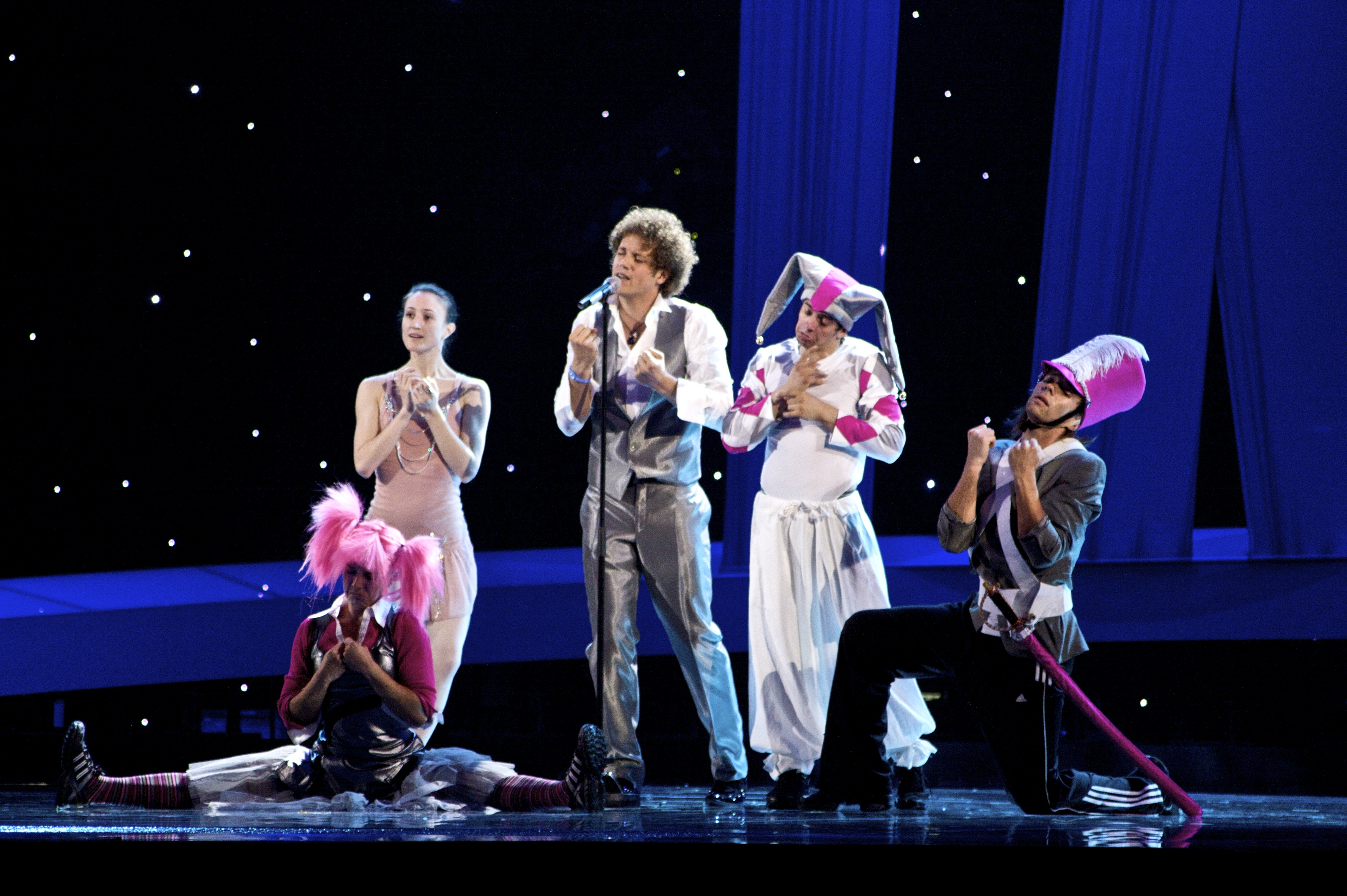 Foto: Vincent Hasselgård, Aktiv I Oslo.no Les artikkel på